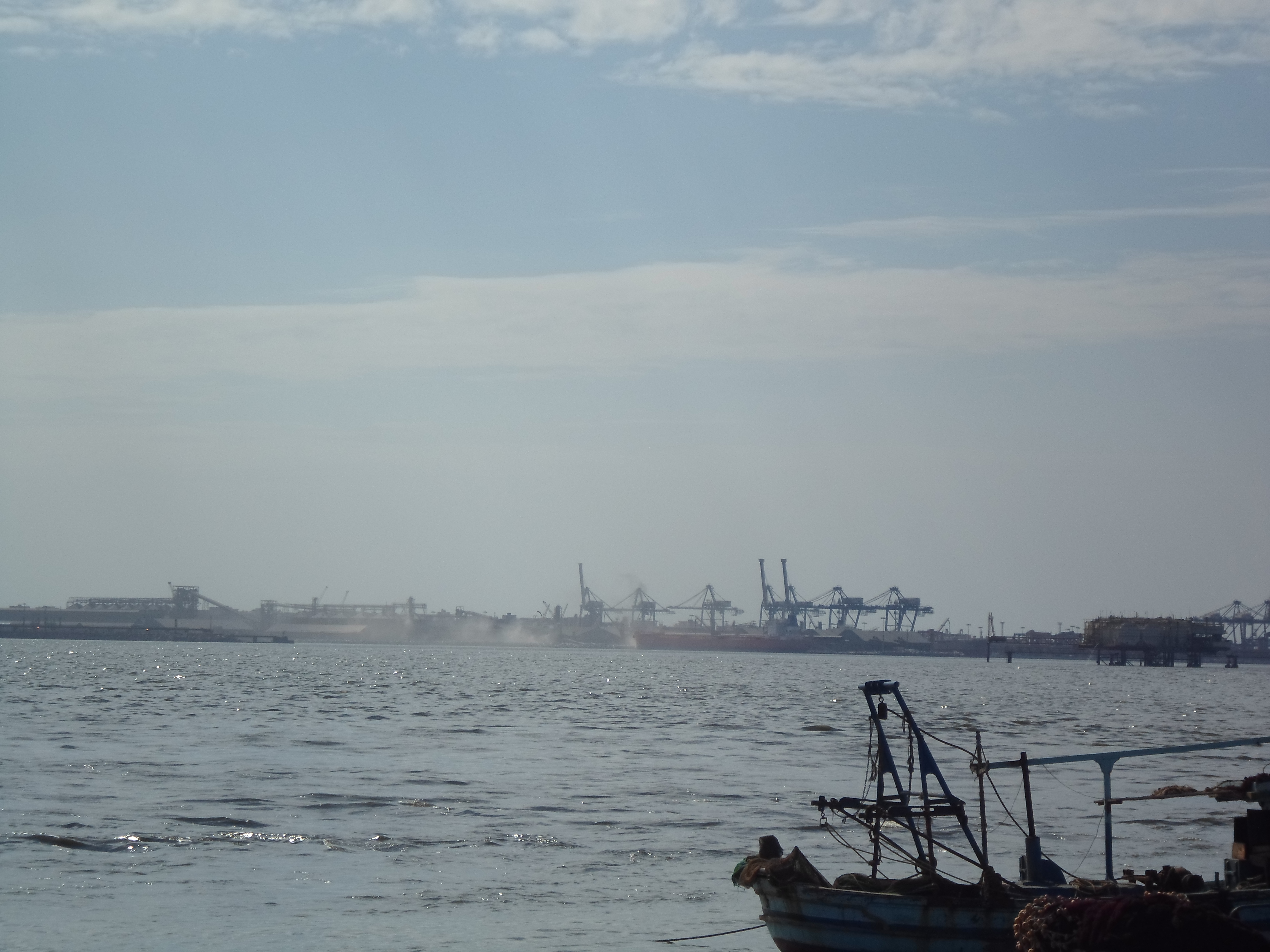 ميناء مراكب الصيد - بحري - الاسكندرية